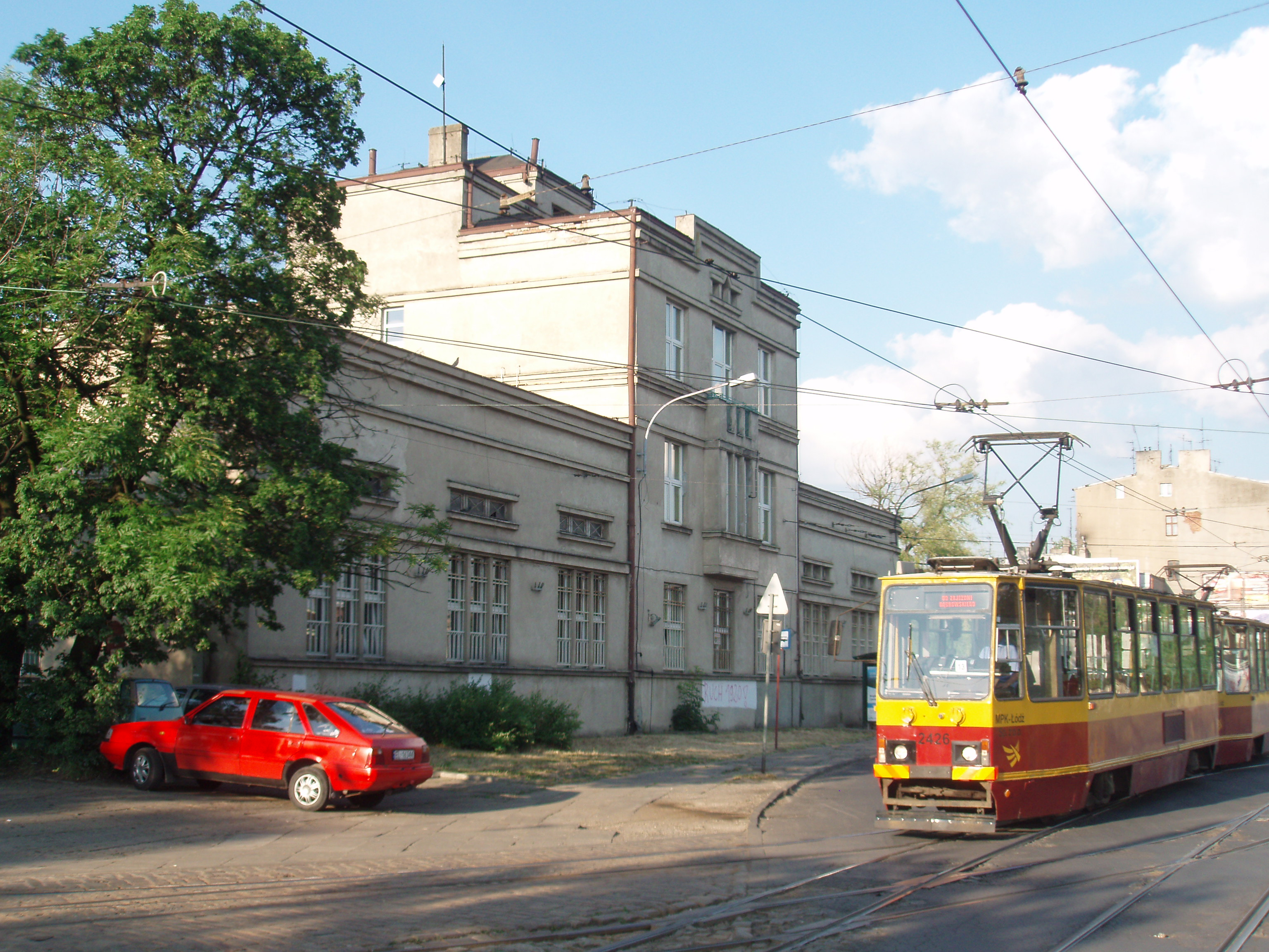 Widok na budynek administracyjny zajezdni od ul. Dąbrowskiego